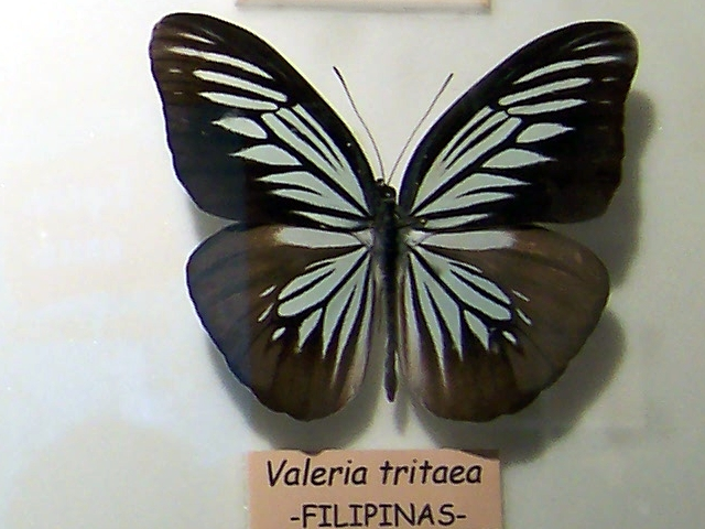 Pareronia tritaea (C. & R. Felder, 1859) (syn.: Valeria tritaea)